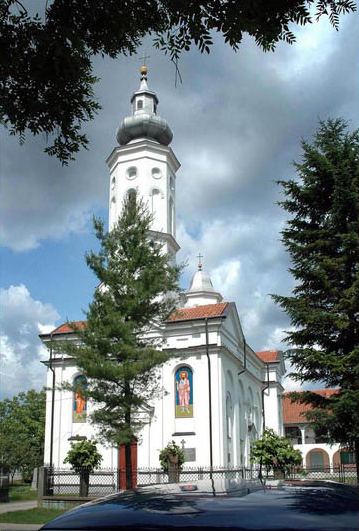 Serbian Orthodox Church in Lešnica, Serbia/L'église orthodoxe serbe des saints Pierre et Paul à Lešnica, Serbie